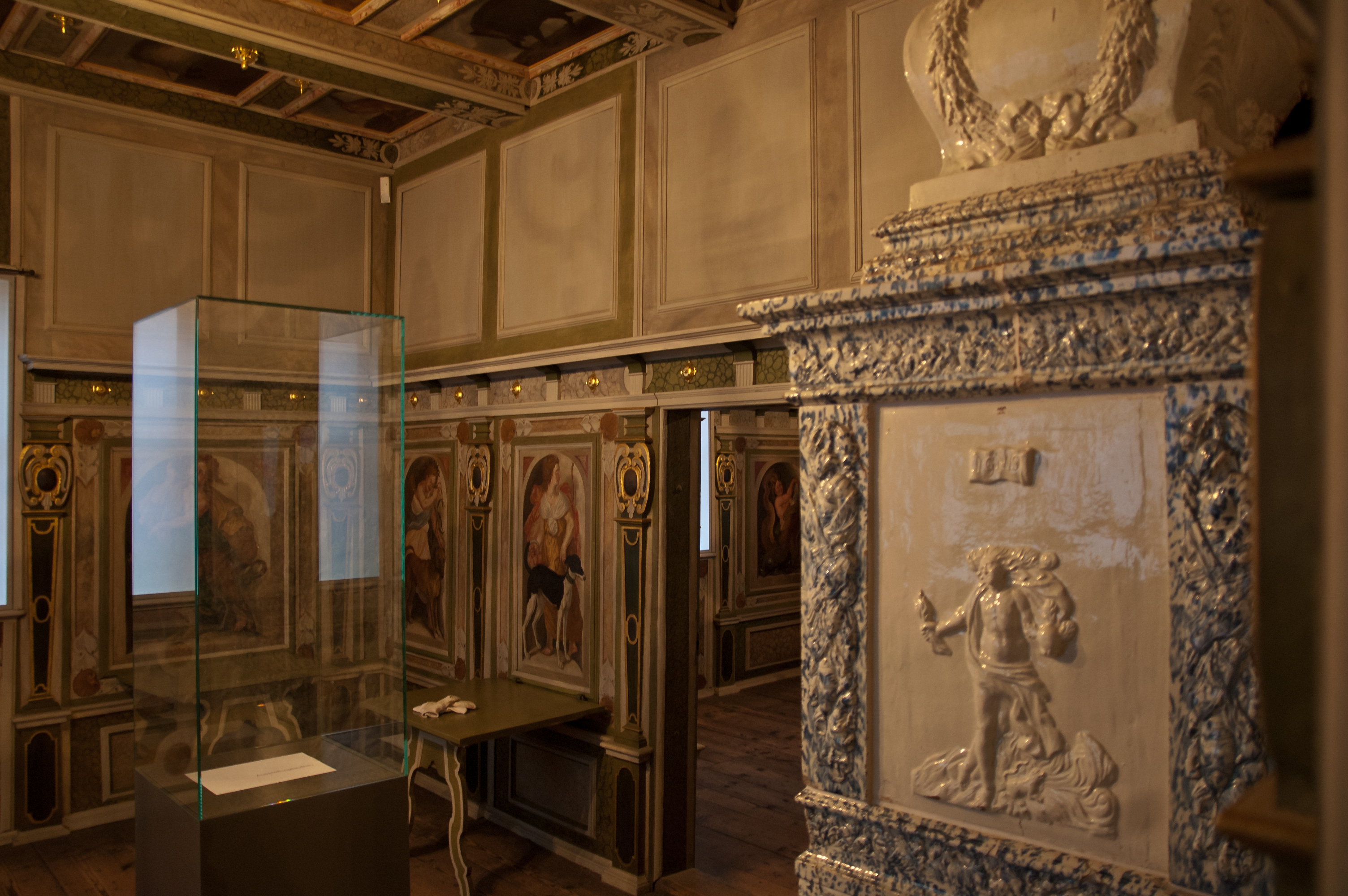 Im Fürstenzimmer des Gutes Hoflößnitz